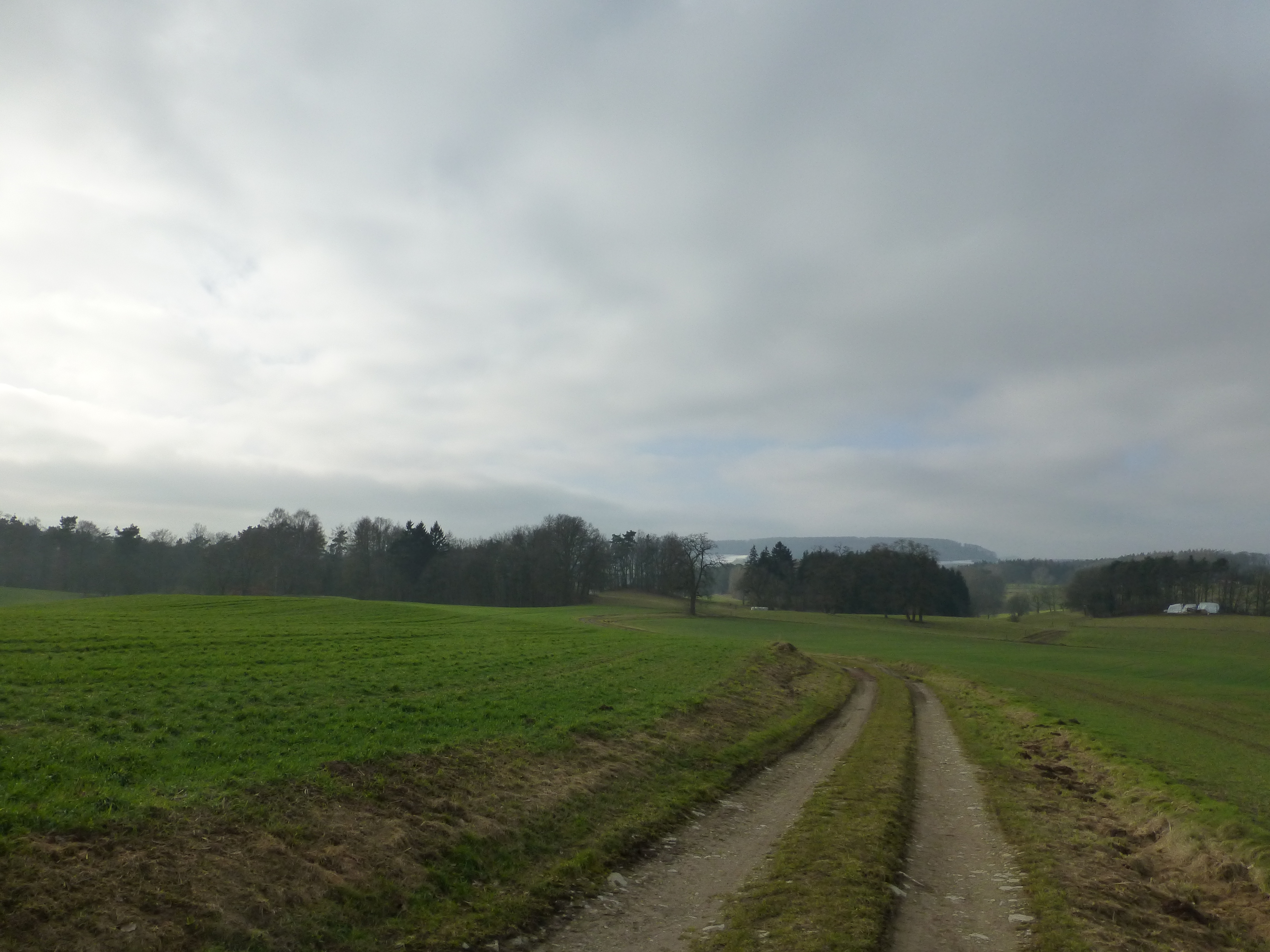 Blick über die nördliche Gemarkung von Schachtebich (Gänseteich) mit der Wüstung Lentershagen, am rechten Bildrand beginnt die Gemarkung von Freienhagen